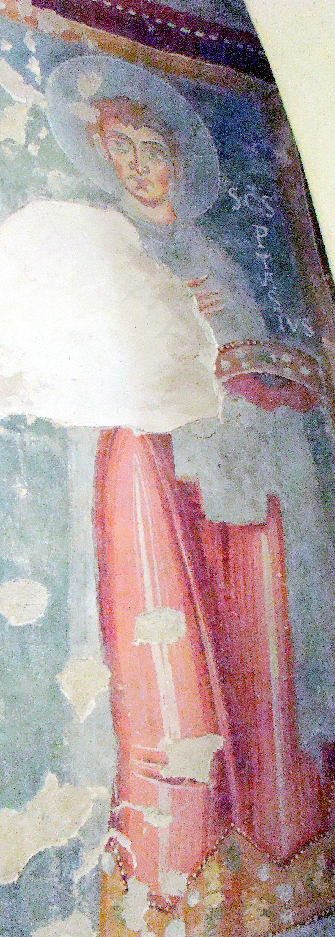 Affresco della controfacciata Chiesa di Santa Maria Assunta Sorengo foto utente Elvezio